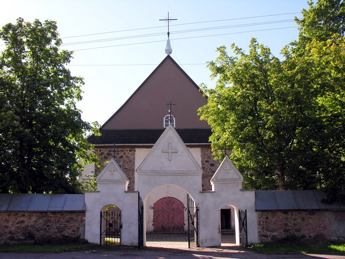 Židikų Šv. Jono Krikštytojo bažnyčia Vartai Foto: Algirdas, 2006 m. rugsėjo 9 d., Lietuva